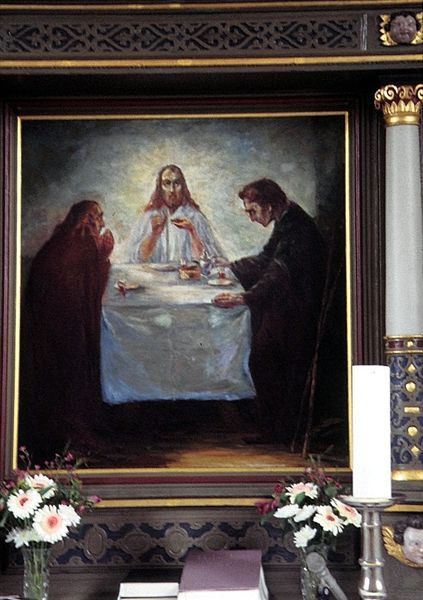 Ølstrup Kirke i Danmark. Altertavle